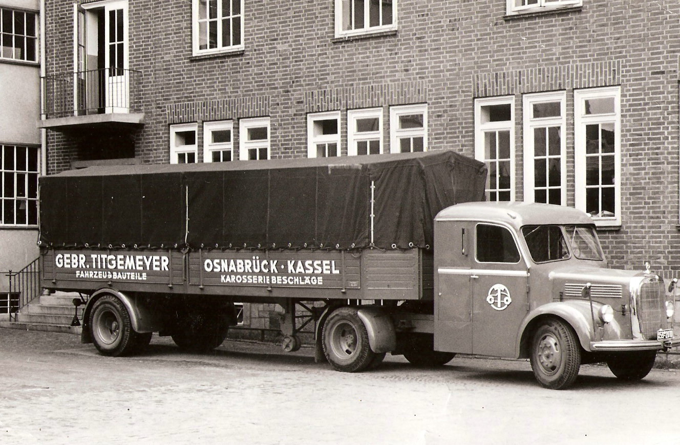 Mercedes-Benz LKW (Werkverkehr) kleinerer Sattelzug mit Spezial-Fahrerhaus